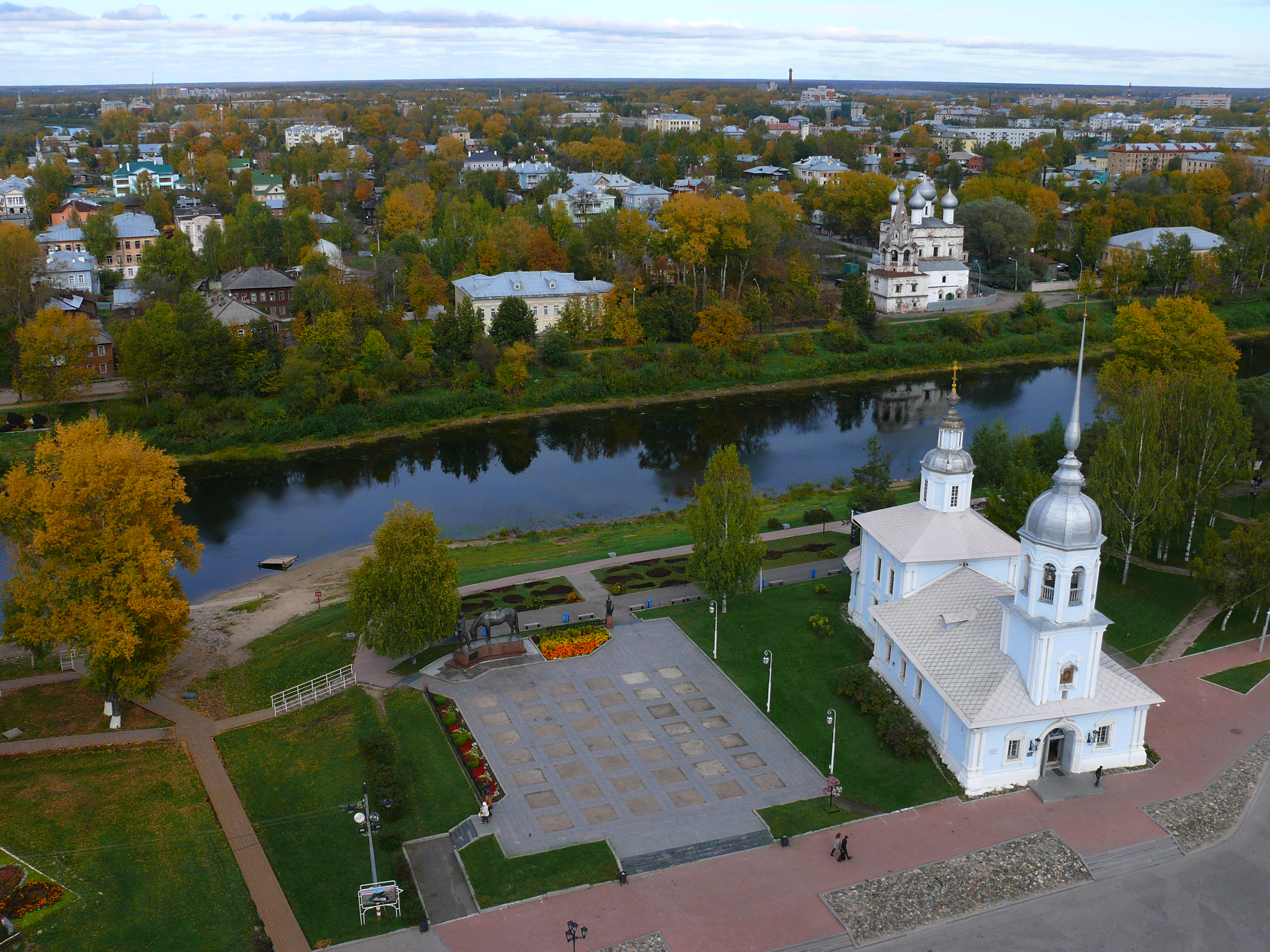 Церковь Александра Невского (Вологодская область, Вологда, С. Орлова улица)